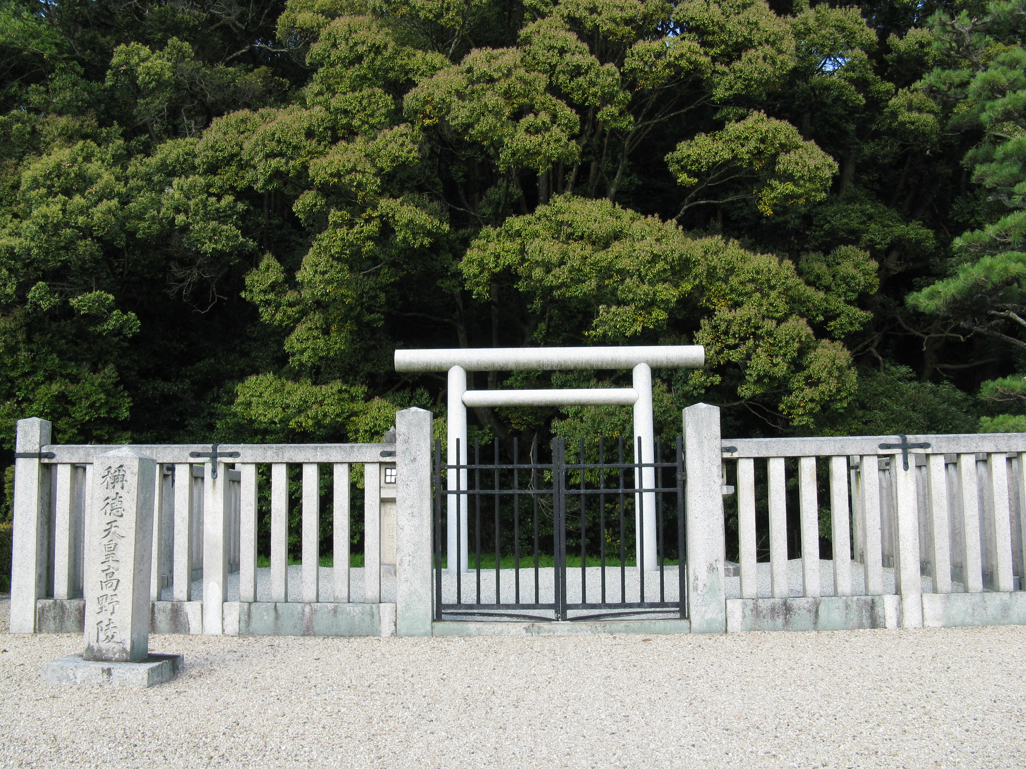 稱德天皇 高野陵